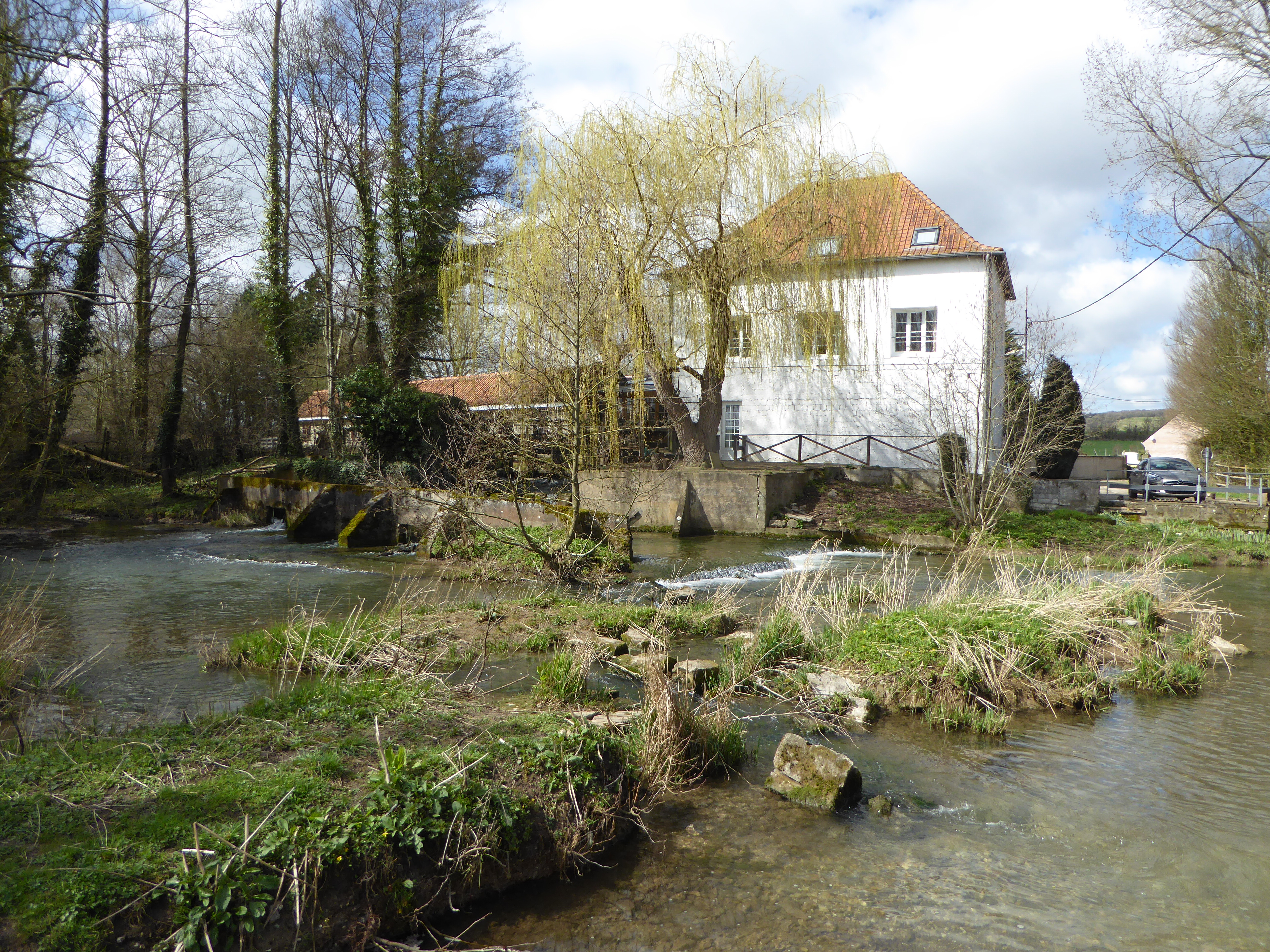 La Hem (river) au moulin d'Audenfort, Clerques, Pas-de-Calais.- Hauts-de-France.